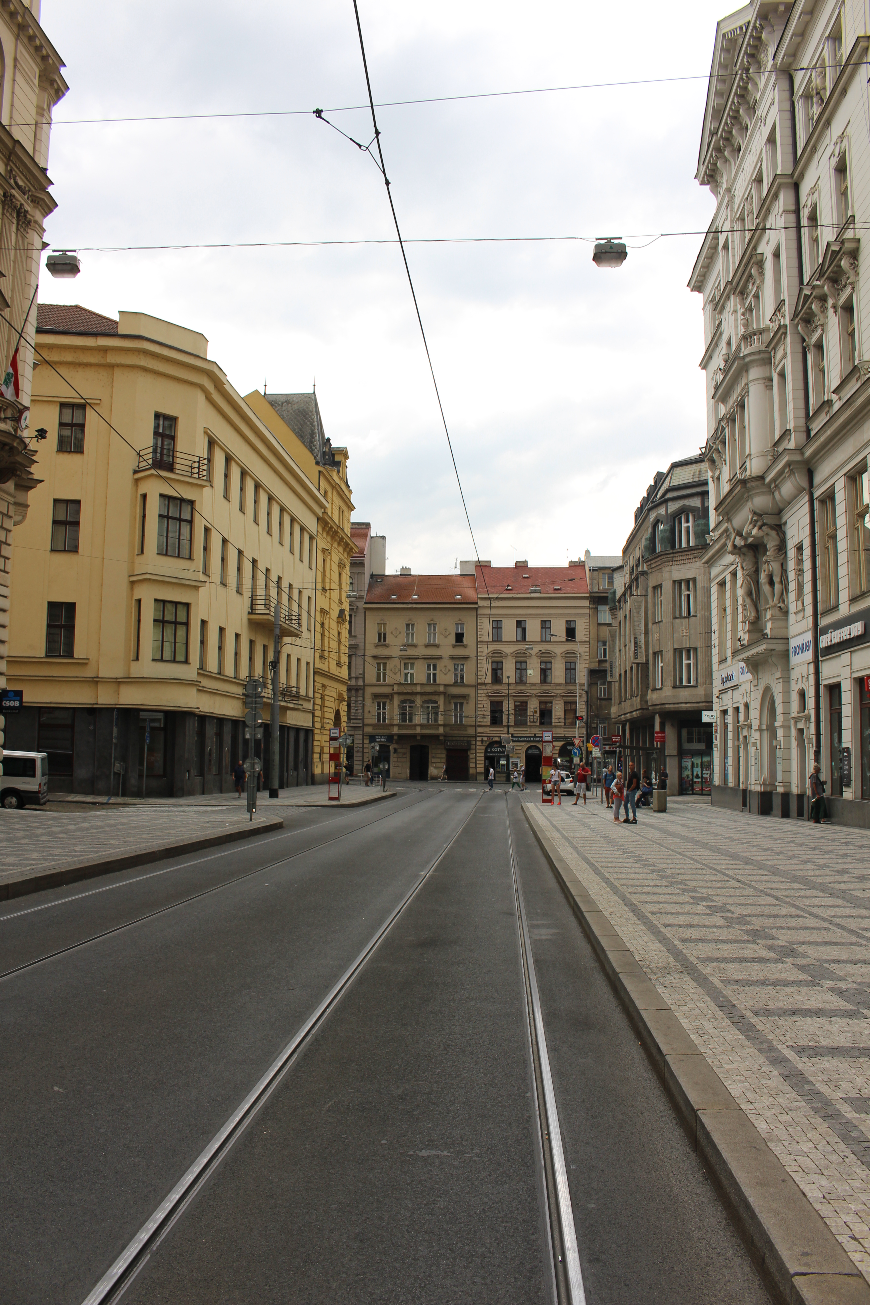 Lazarská - pohled do Spálené